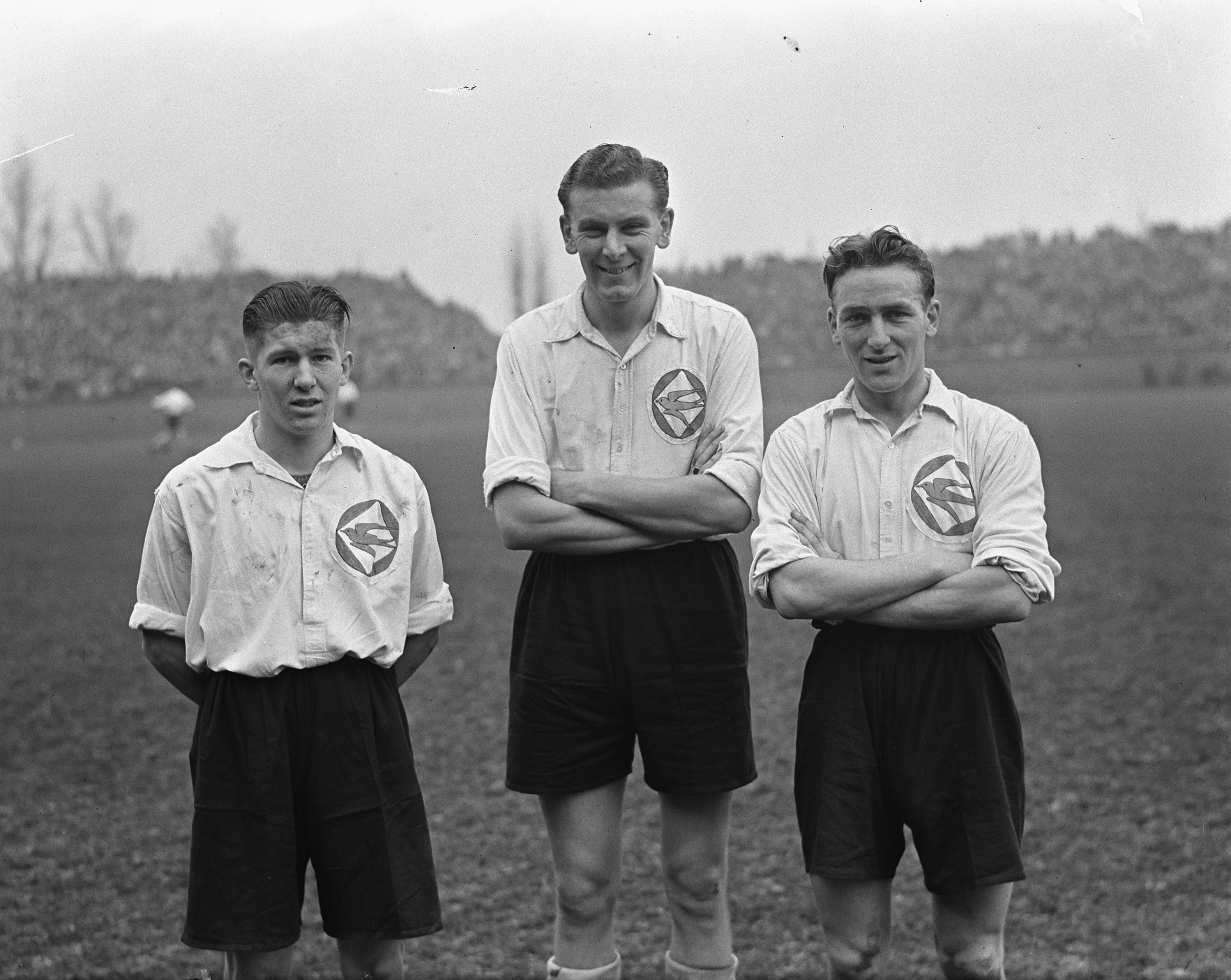 Collectie / Archief : Fotocollectie Anefo Reportage / Serie : [ onbekend ] Beschrijving : Voetba. Amsterdam tegen Zwaluwen. Spelers Zwaluwen, Vlnr. de Kubber, van Tuyl , Biesbrouck Datum : 31 december 1949 Persoonsnaam : Biesbronch, De Putten, Zwaluwen Fotograaf : Vermorken, […] / Anefo Auteursrechthebbende : Nationaal Archief Materiaalsoort : Glasnegatief Nummer archiefinventaris : bekijk toegang 2.24.01.09 Bestanddeelnummer : 903-7729